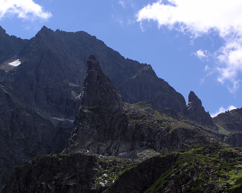 W centrum zdjęcia ostra piramida Mnicha na tle północnej ściany Cubryny, po prawej Zadni Mnich. Płat śniegu po lewej na górze leży w górnych partiach Wielkiej Cubryńskiej Galerii, nad nim znajduje się Hińczowa Przełęcz, niewidoczna, bo zasłonięta przez grań odchodzącą w lewo od wierzchołka Cubryny. Wąski pasek śniegu na lewo od Mnicha znajduje się na Małej Cubryńskiej Galerii. Widok ze zboczy Miedzianego.